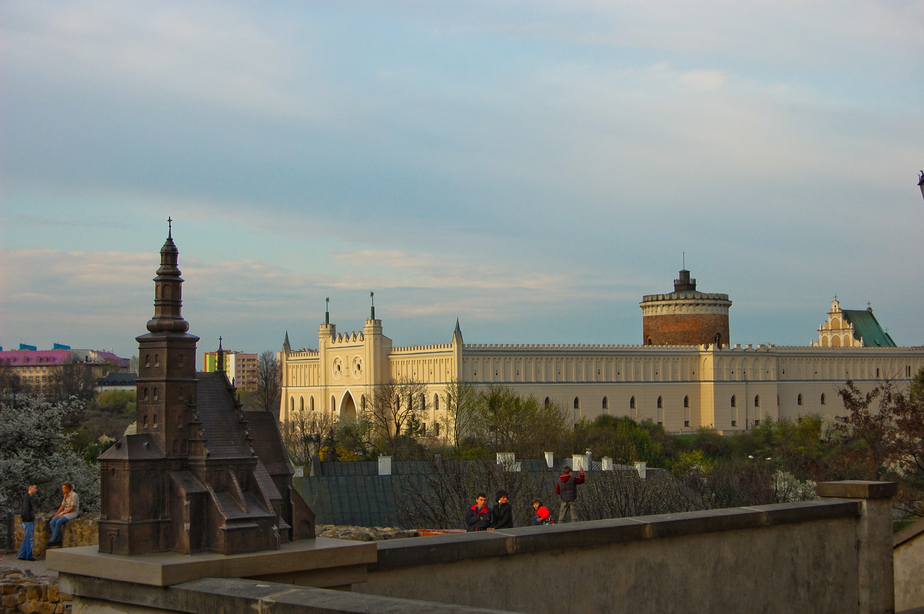 Plac Po Farze na Starym Mieście w Lublinie. Widok na lubelski zamek i znajdujący się na nim XIII-wieczny donżon oraz kaplicę Trójcy Świętej. Na pierwszym planie stojąca pod domem mansjonarskim makieta kościoła farnego p.w. św. Michała, znajdującego się niegdyś na placu Po Farze.